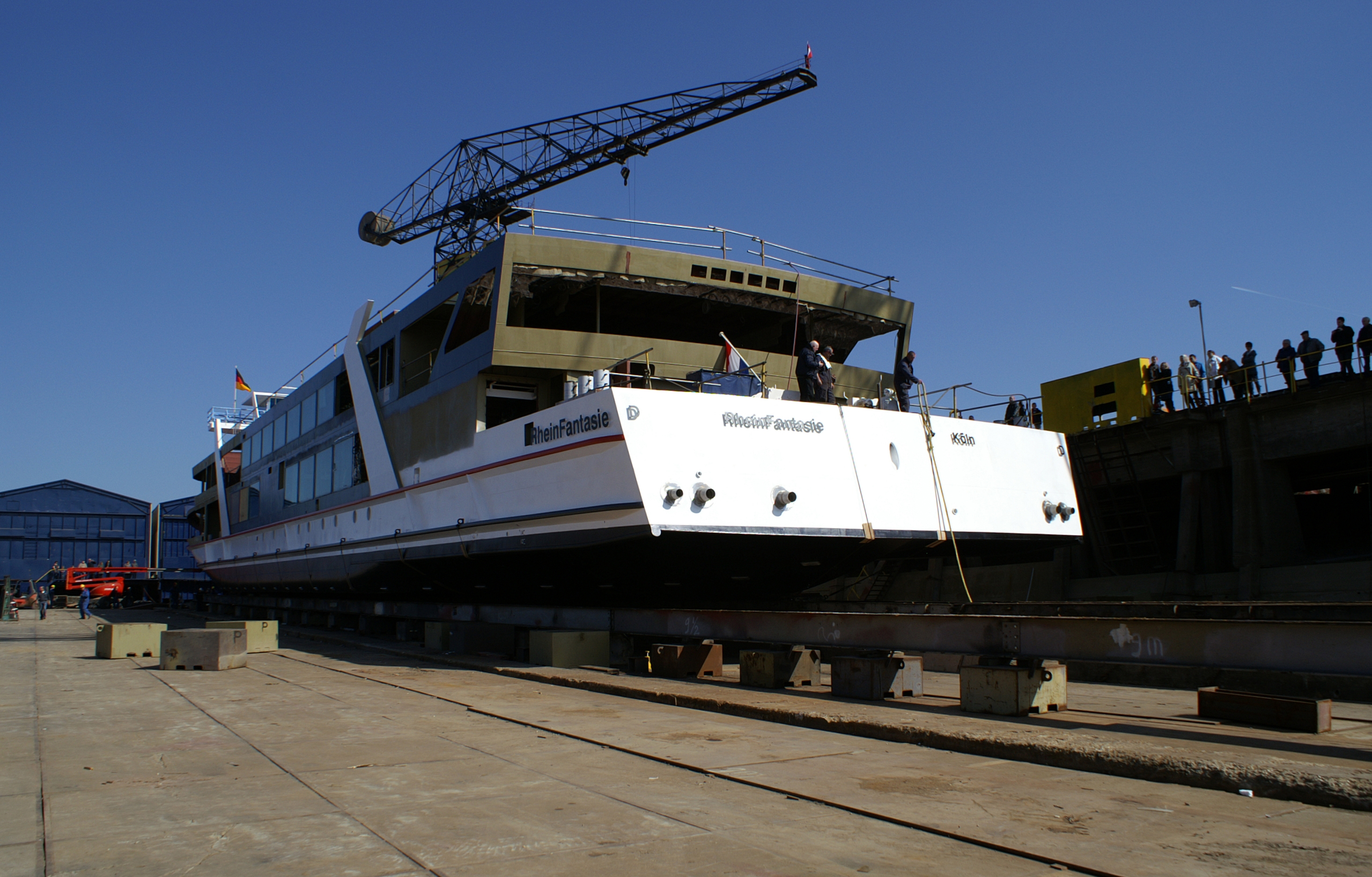 Stapellauf des Ausflug- und Veranstaltungsschiff RheinFantasie der Köln-Düsseldorfer am 27. März 2011 bei der De Hoop-Werft in Rijnwaarden-Lobith.